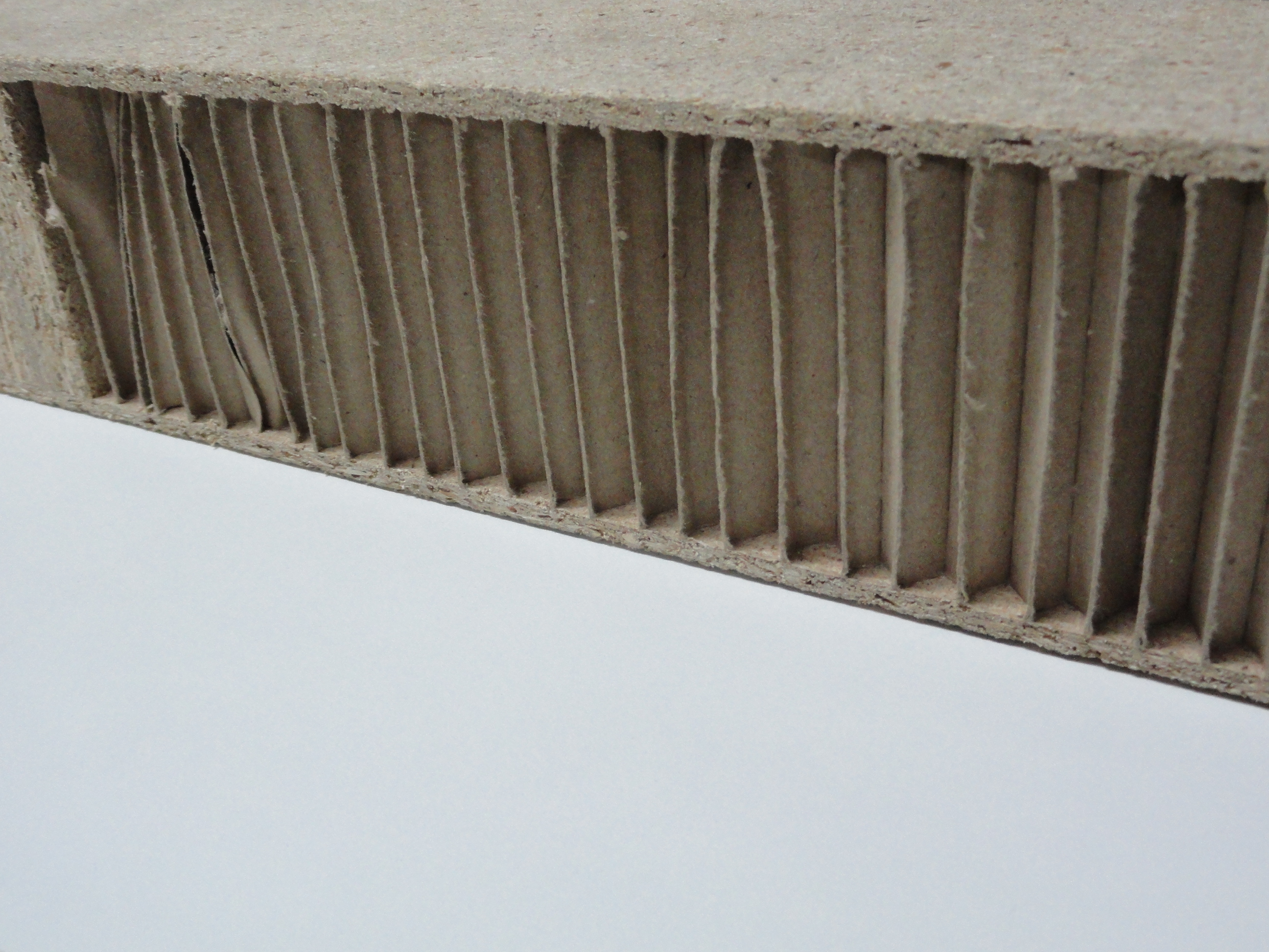 Тамбурат